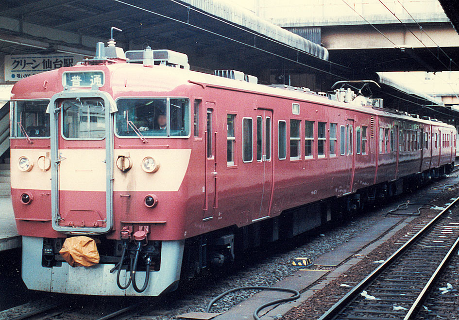 国鉄 417系電車